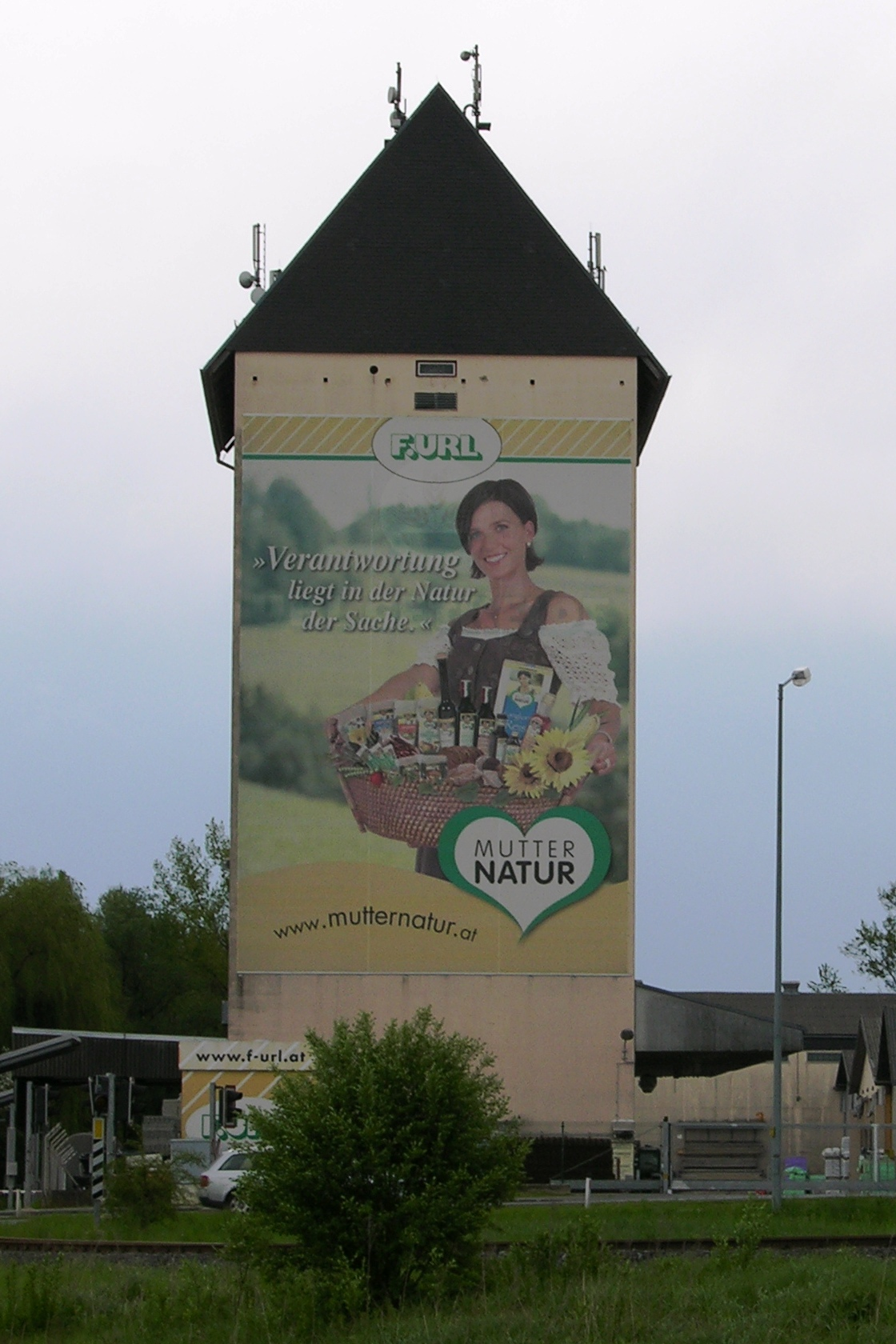 Lannach ANsicht Turm